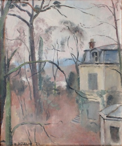 Paysage